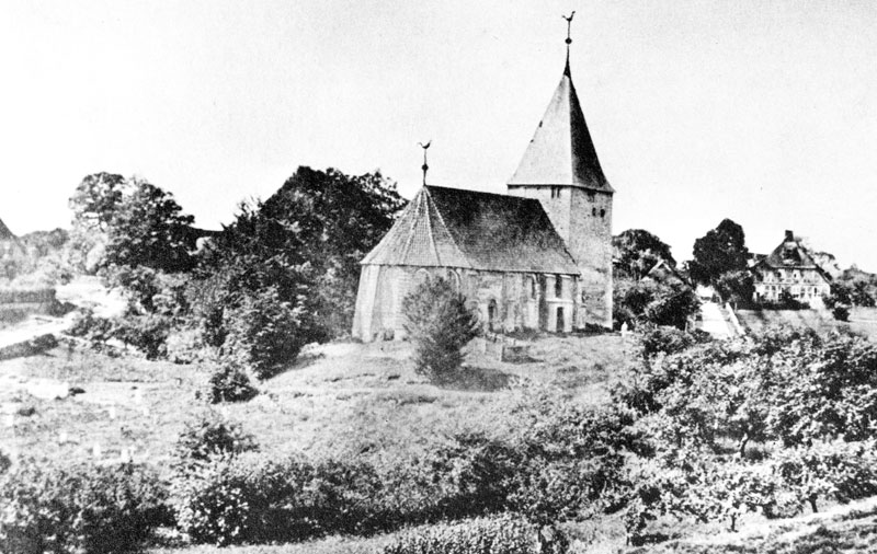 St.-Martins-Kirche in Raven